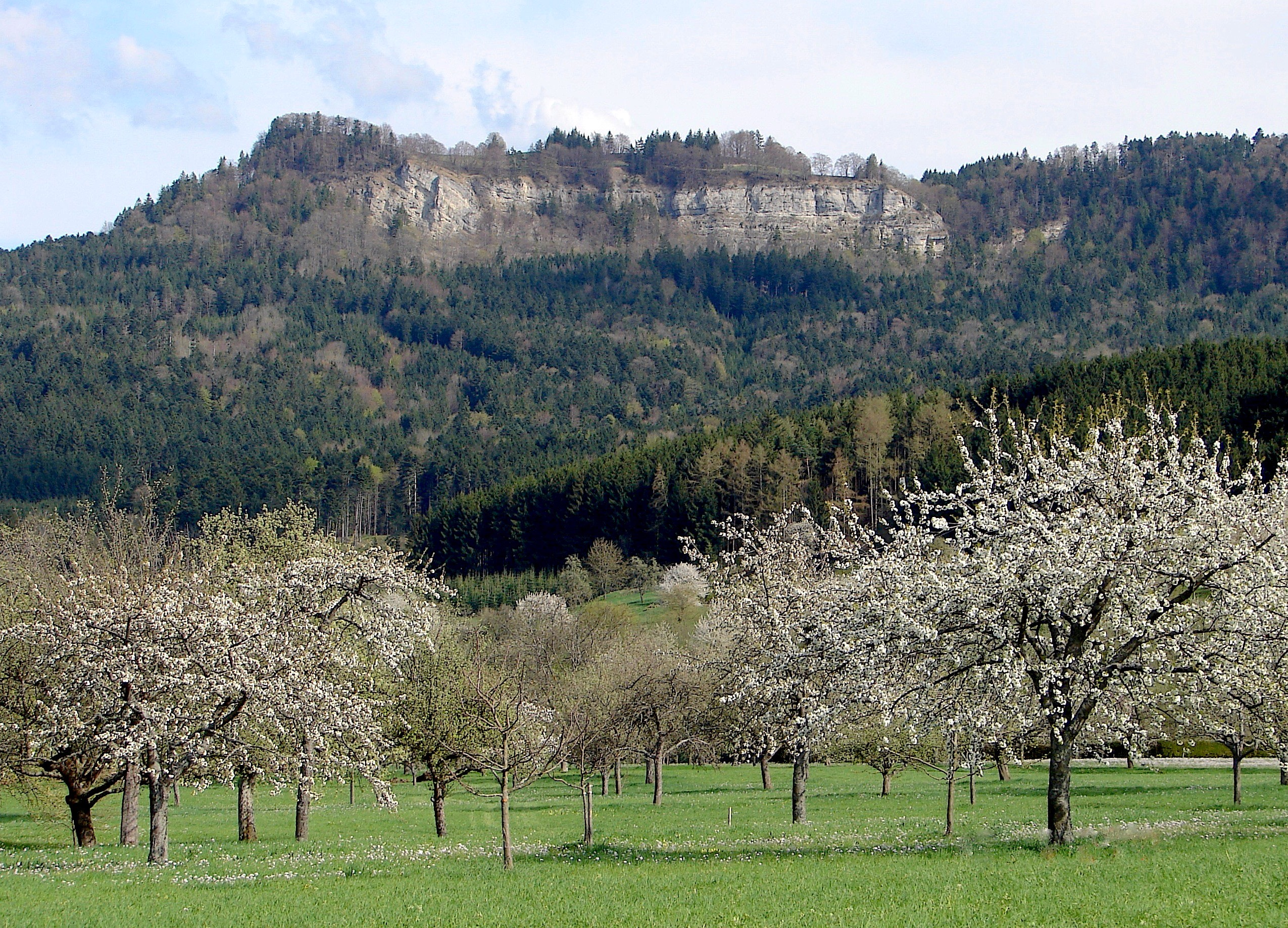 Streuobstwiesen mit Blick auf den Traufgang und das Hörnle